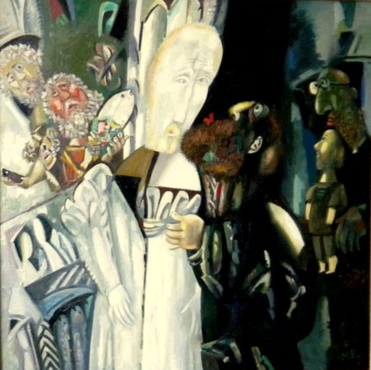 Художник Миша Брусиловский."Поцелуй Иуды". 100 х 100.